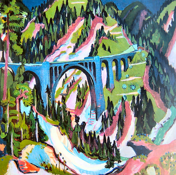 Ernst Ludwig Kirchner: Brücke bei Wiesen, 1926, Öl auf Leinwand, 120 x 120 cm, Gordon 844, Kirchner Museum Davos